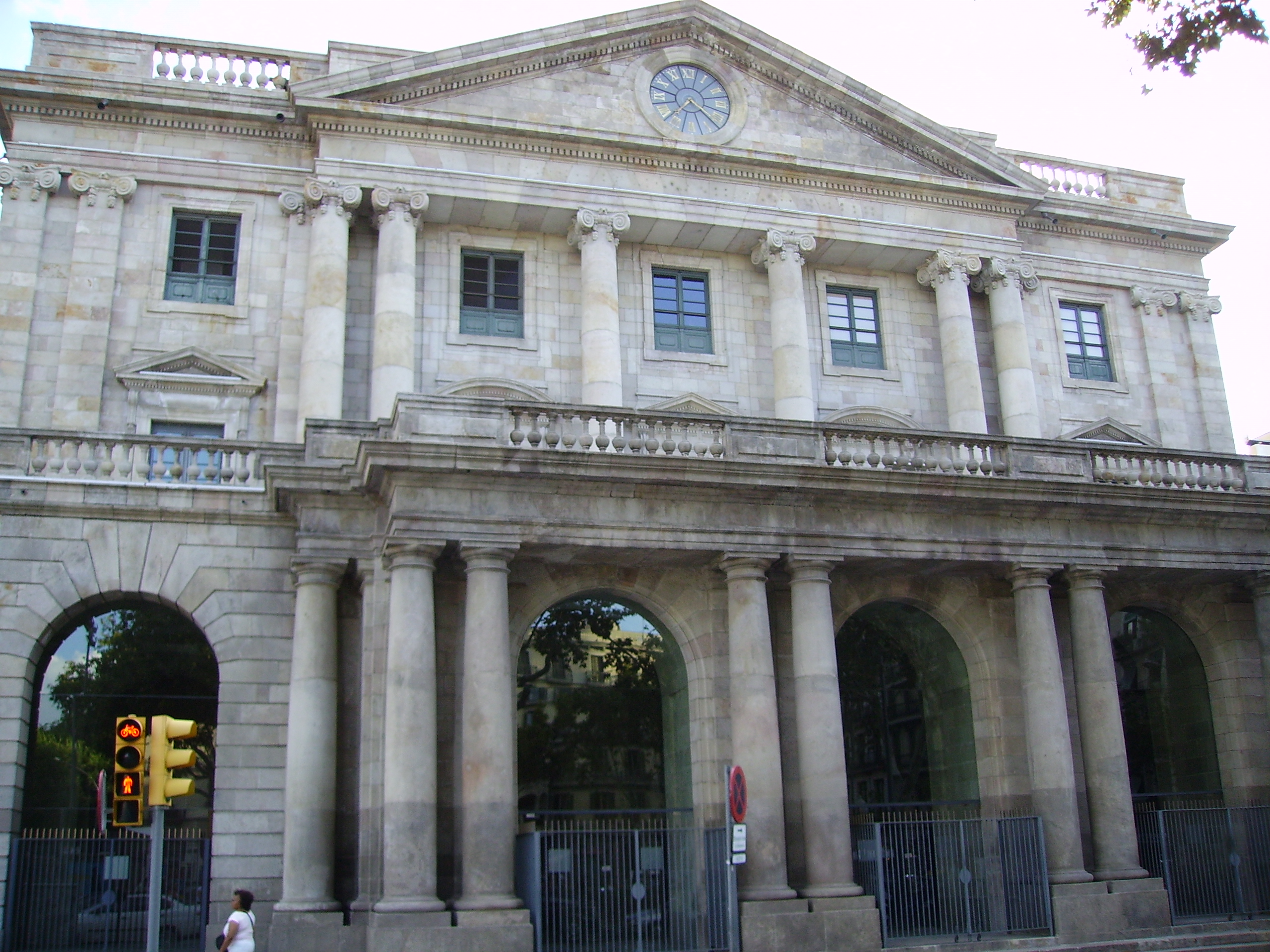 La Llotja de Mar (Pla de Palau), Barcelona, Catalunya.